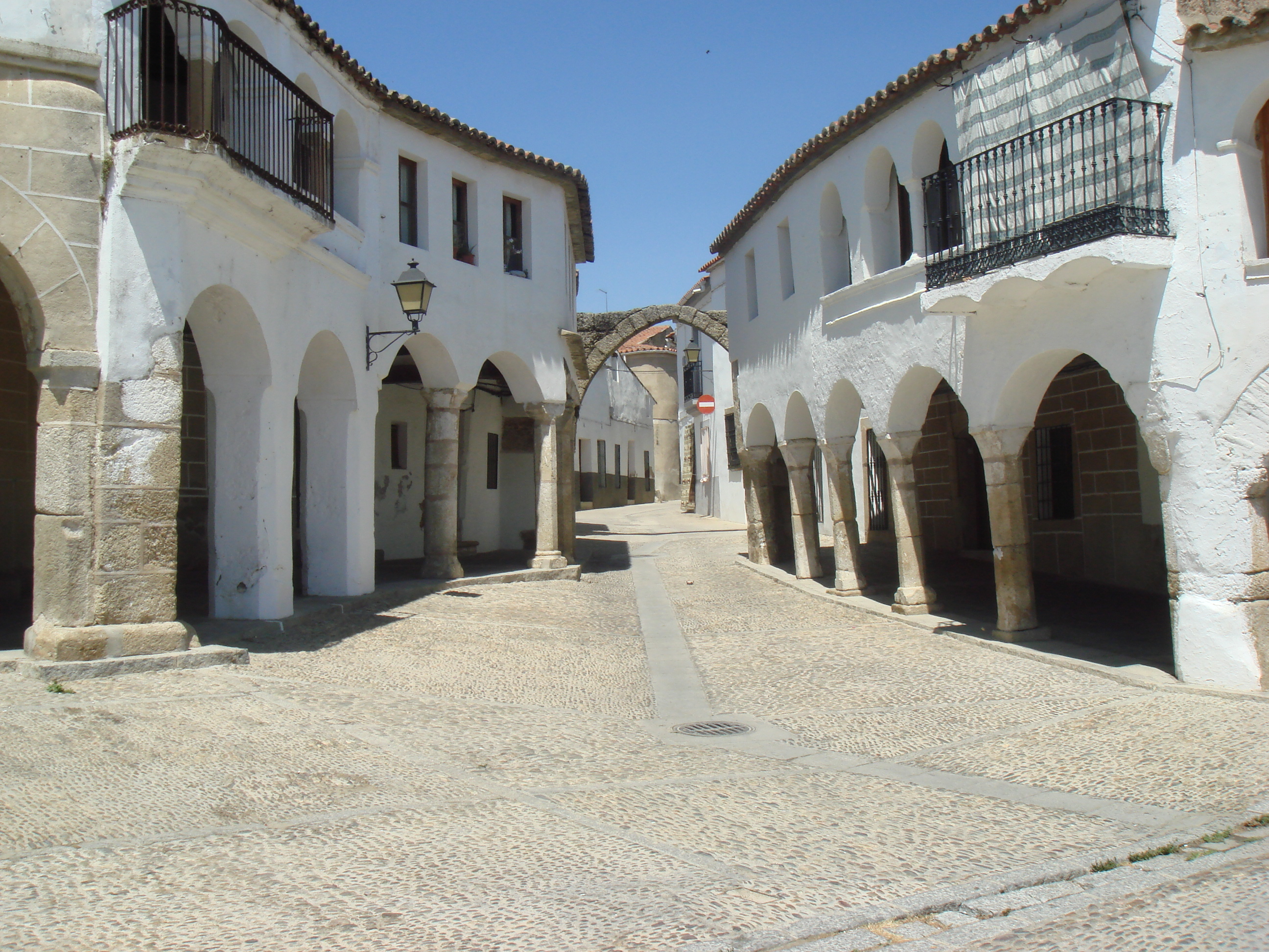 Garrovillas de Alconétar (Cáceres)